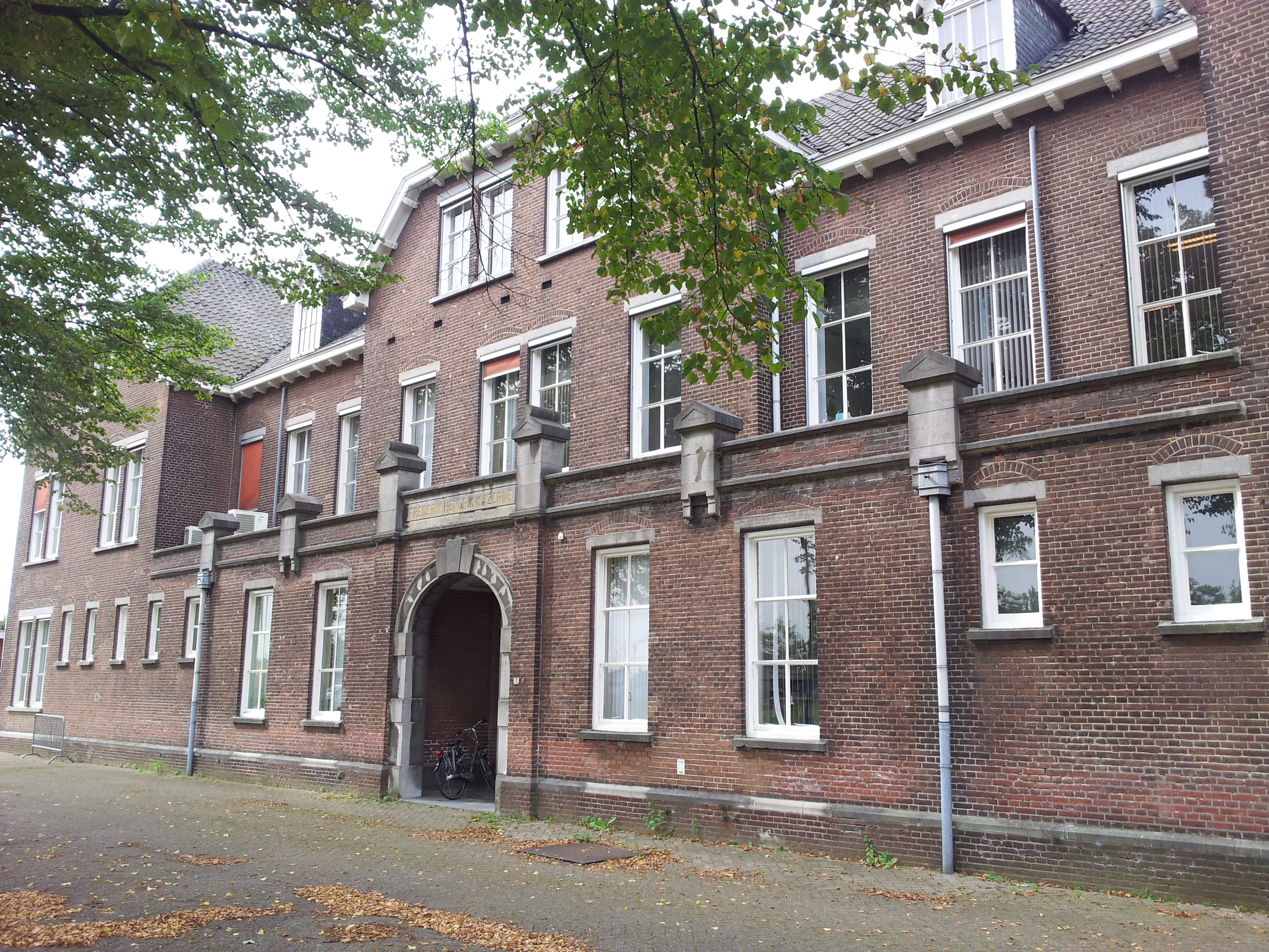 Vml. Wachtgebouw (A)